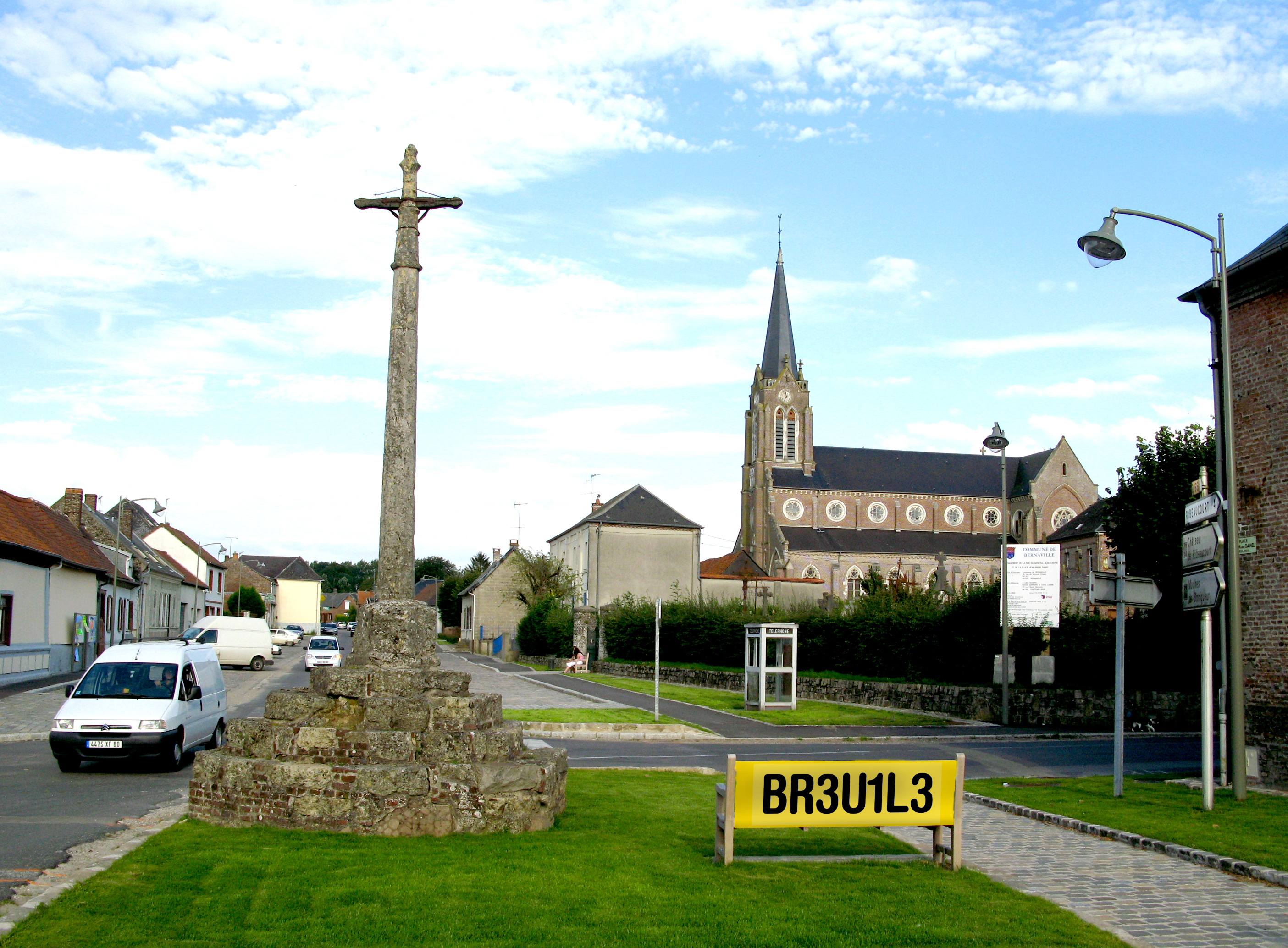 Bernaville